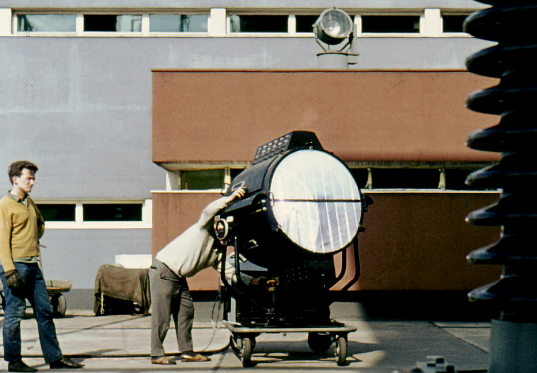 Ein Kohlebogen-Scheinwerfer bei Filmaufnahmen mit ARRI Hochgeschwindigkeitskamera bei AEG in Kassel 1964